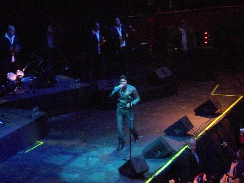 El cantante puertorriqueño Jerry Rivera ofreciendo un concierto en el Teatro Caupolicán. Santiago de Chile, 5 de junio 2010.